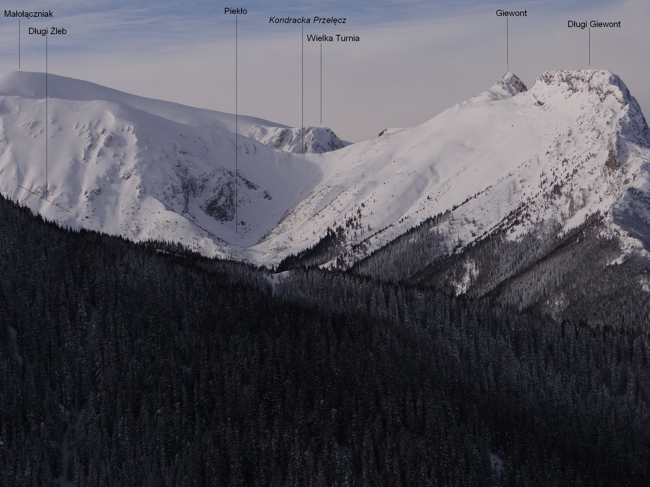 Widok z okolic przełęczy między Kopami